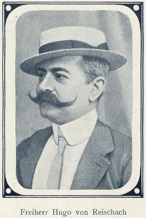 Hugo Freiherr von Reischach (1854-1934), deutscher Hofbeamter, langjähriger Hofmarschall von Kaiser Wilhelm II.